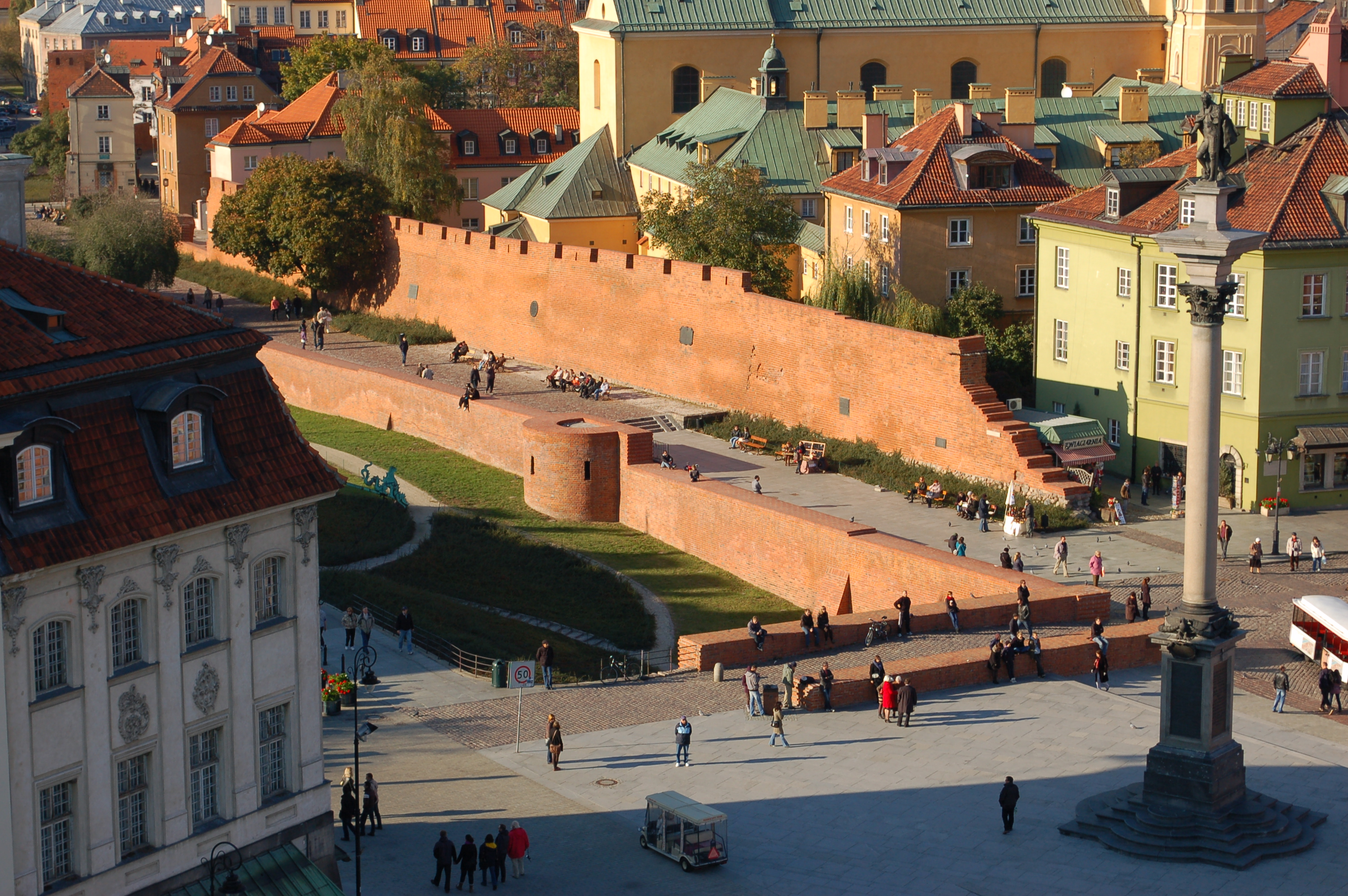 Stadtmauer Warschau vom Kirchturm